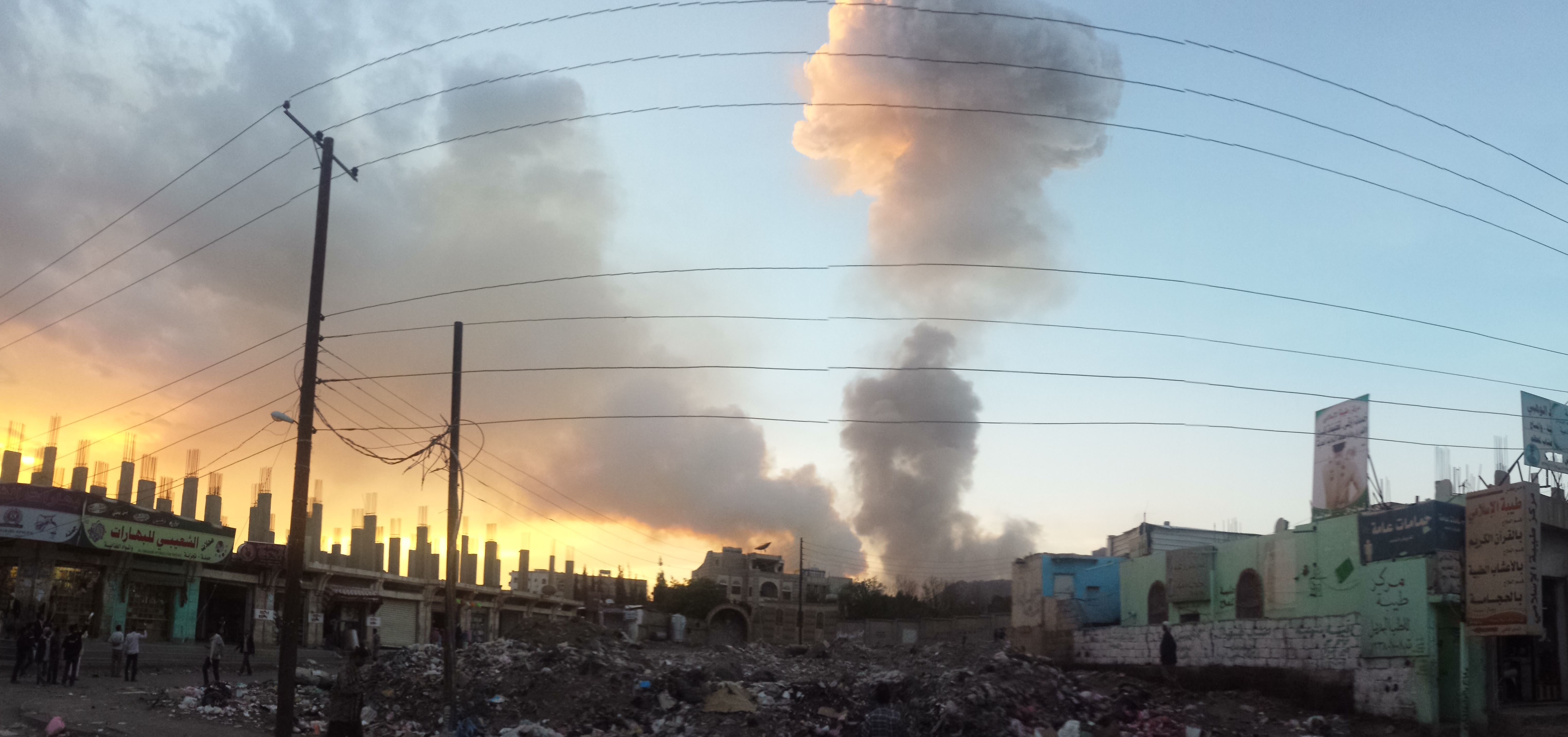 غارة جوية في مخازن الصواريخ والأسلحة في جبل نقم بصنعاء